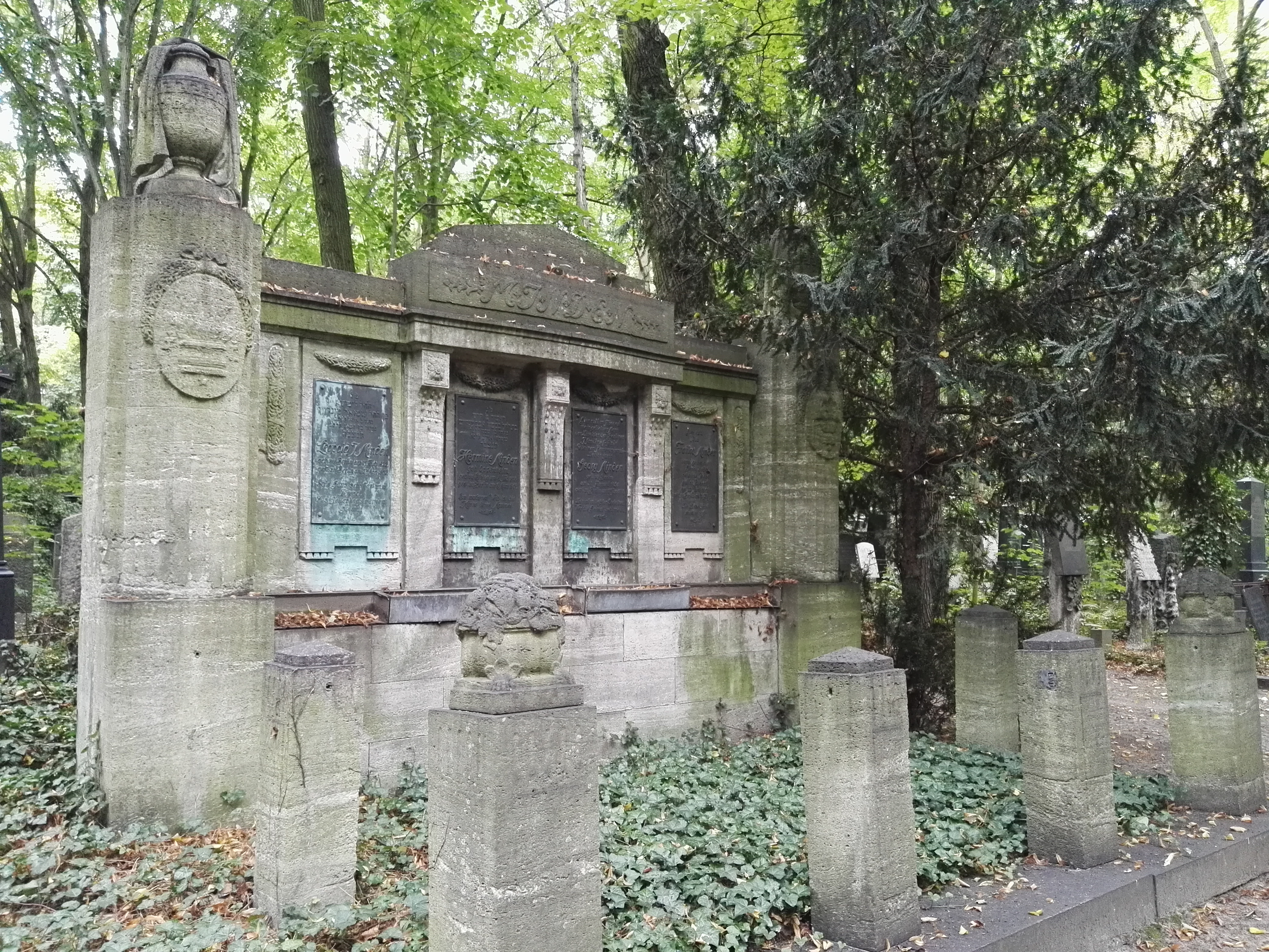 Grab von Georg Minden auf dem denkmalgeschützten Jüdischen Friedhof Berlin-Weißensee